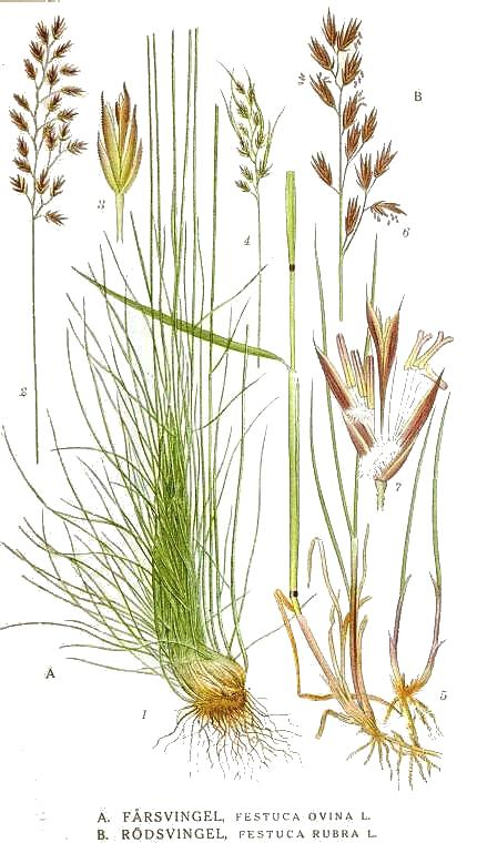 A. Festuca ovina L. s. str. B. Festuca rubra L. Original description "Fårsvingel", Festuca ovina L., "Rödsvingel", Festuca rubra L.